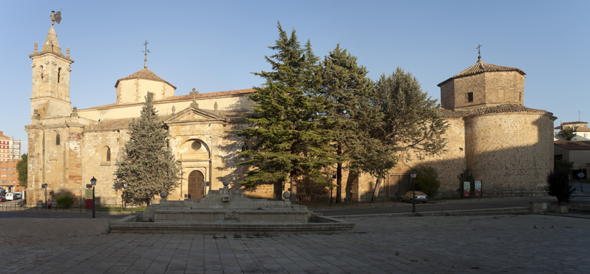 Convento de San Francisco, Molina de Aragón, Guadalajara, España